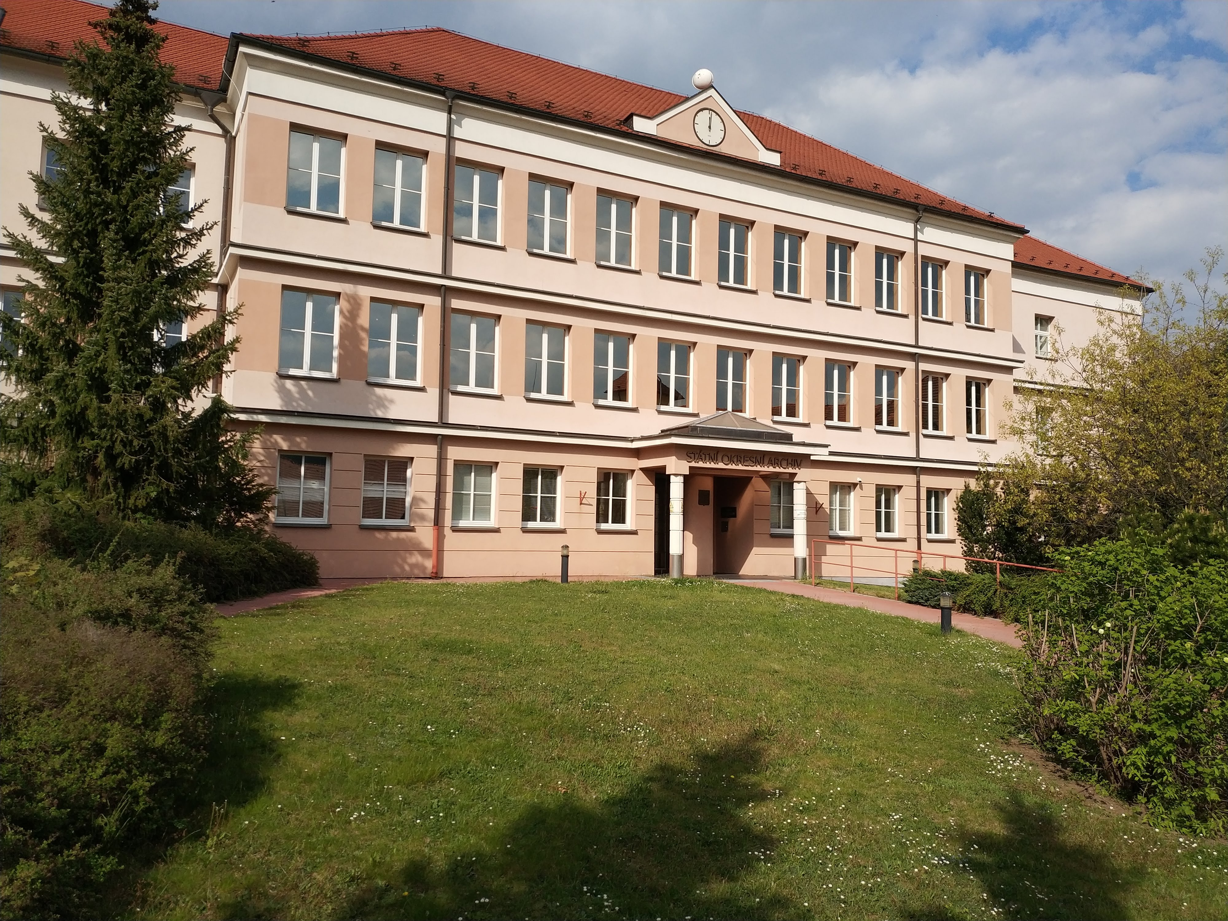 Státní okresní archiv Prachatice - budova.